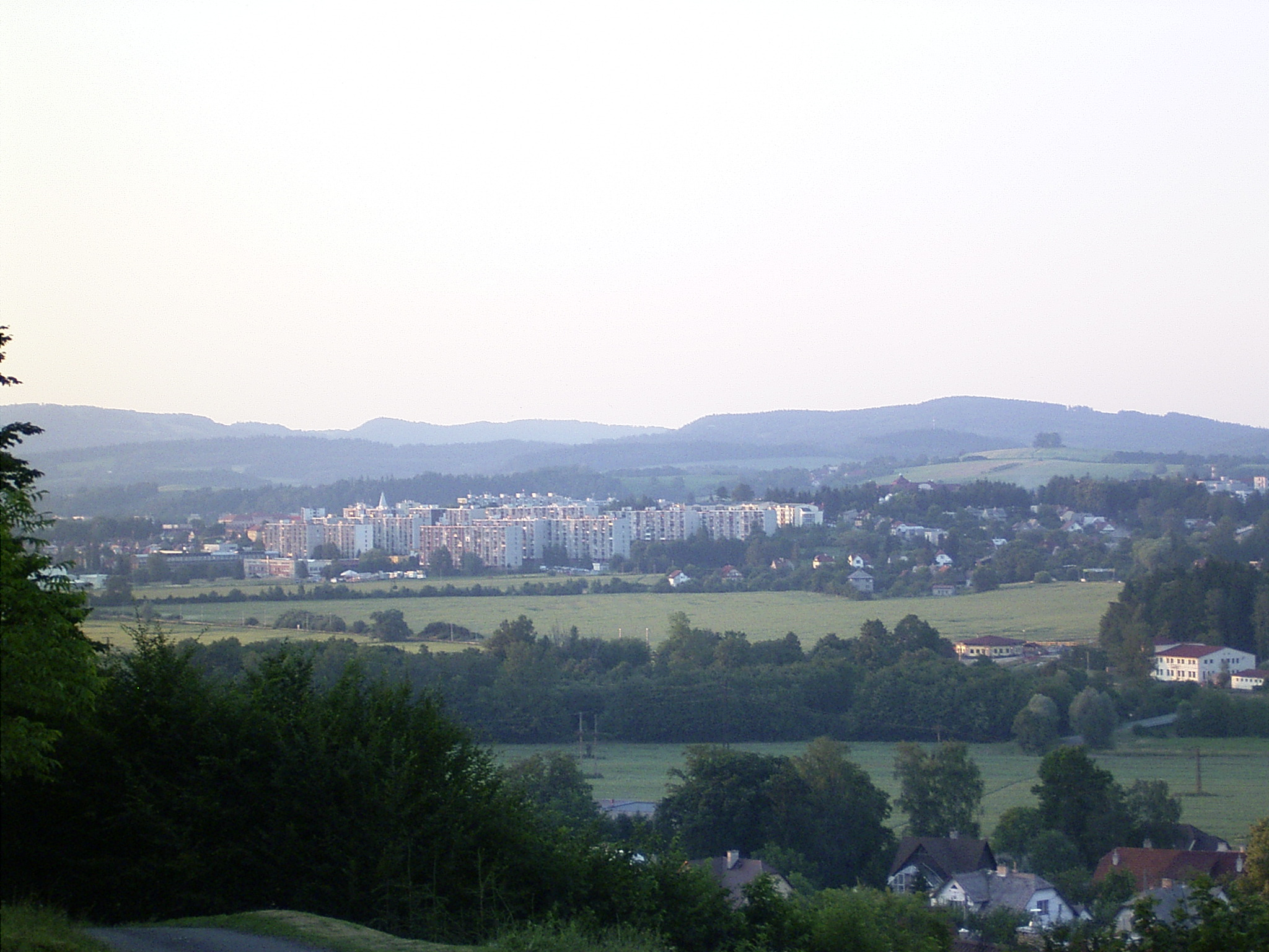 Pohled na Valašské Meziříčí od Jarcovské kuly